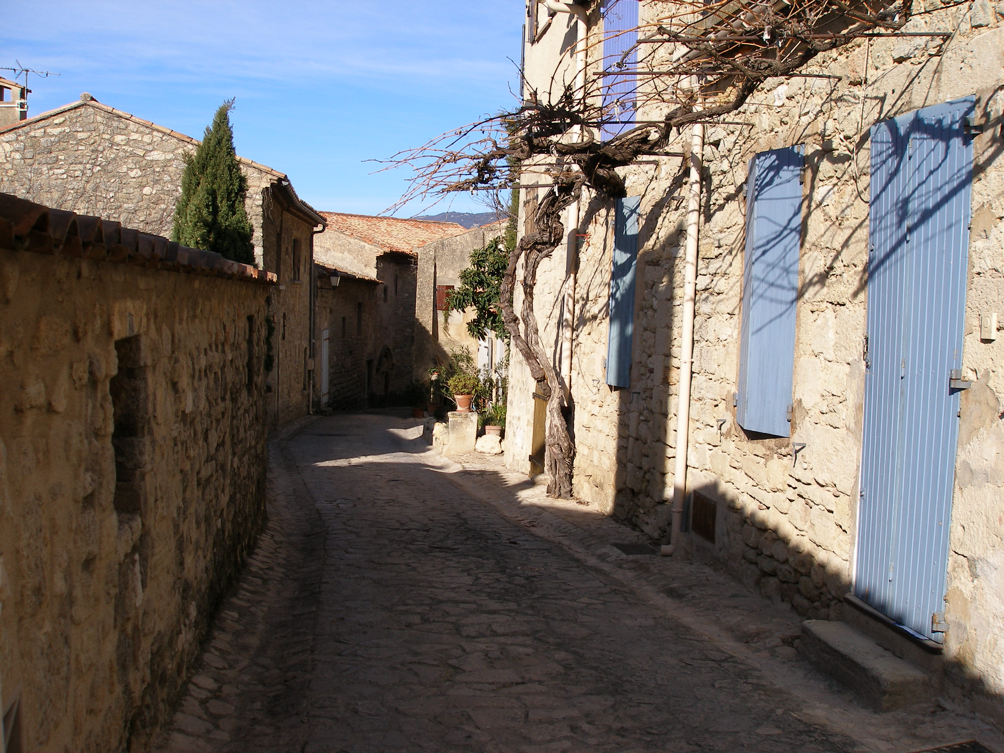 Grambois - Rue caladée